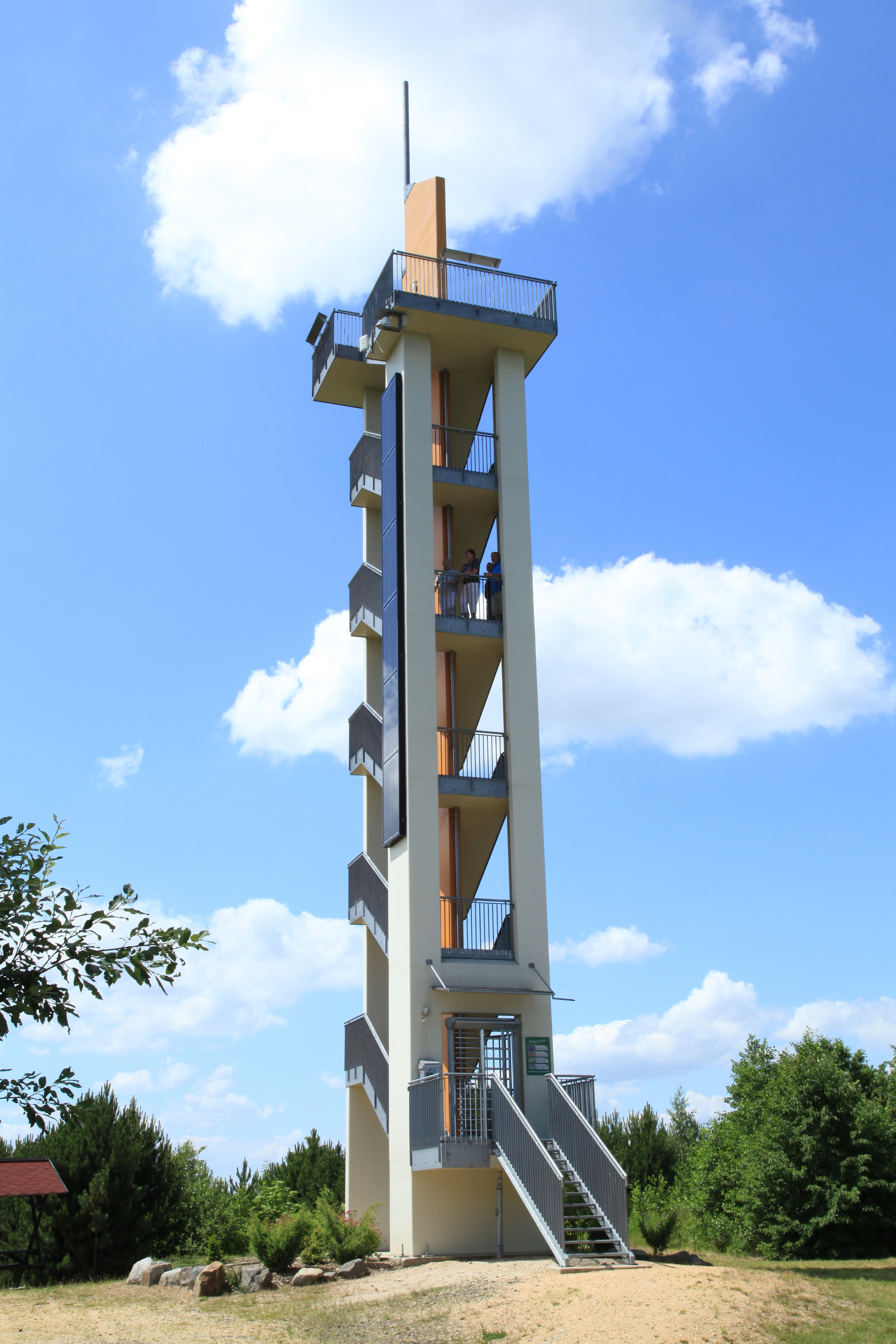 Aussichtsturm Neuberzdorfer Höhe in Schönau-Berzdorf